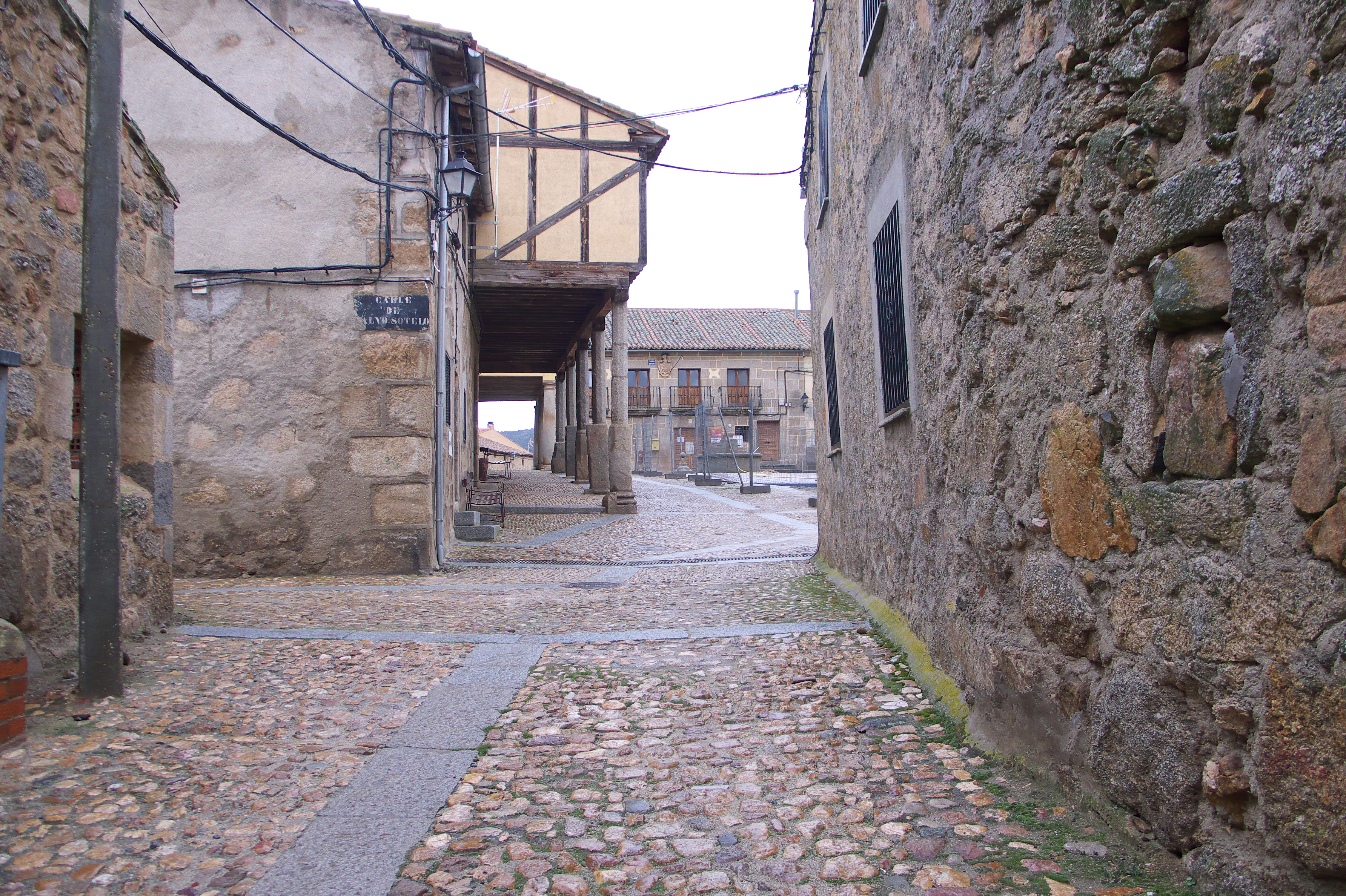 Urbanismo popular